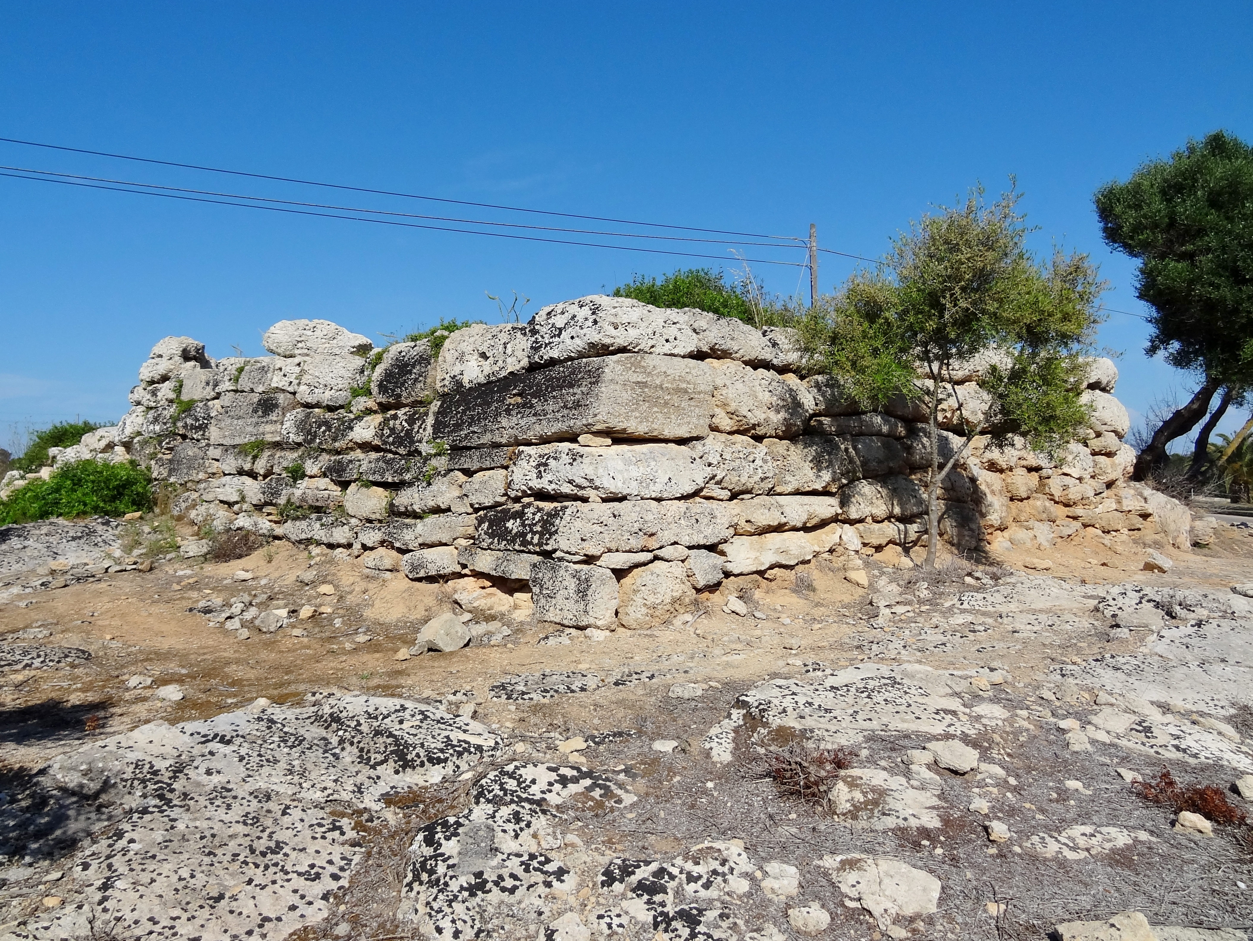 Westecke des Talaiot de sa Cova de sa Nineta am Abzweig der Straße Richtung Son Serra de Marina, Mallorca, Spanien